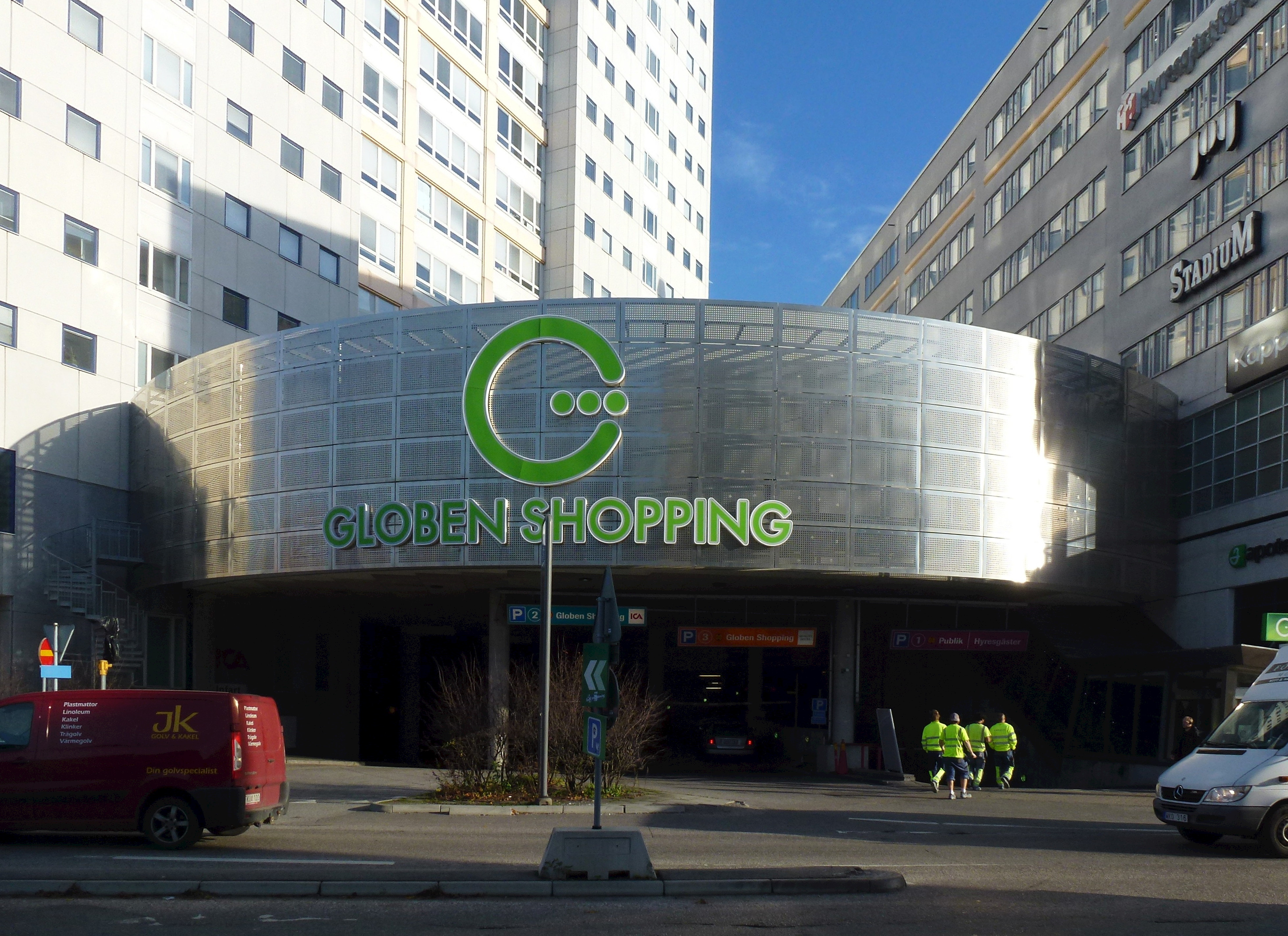 Globen Shopping 25 år, entré från Arenavägen